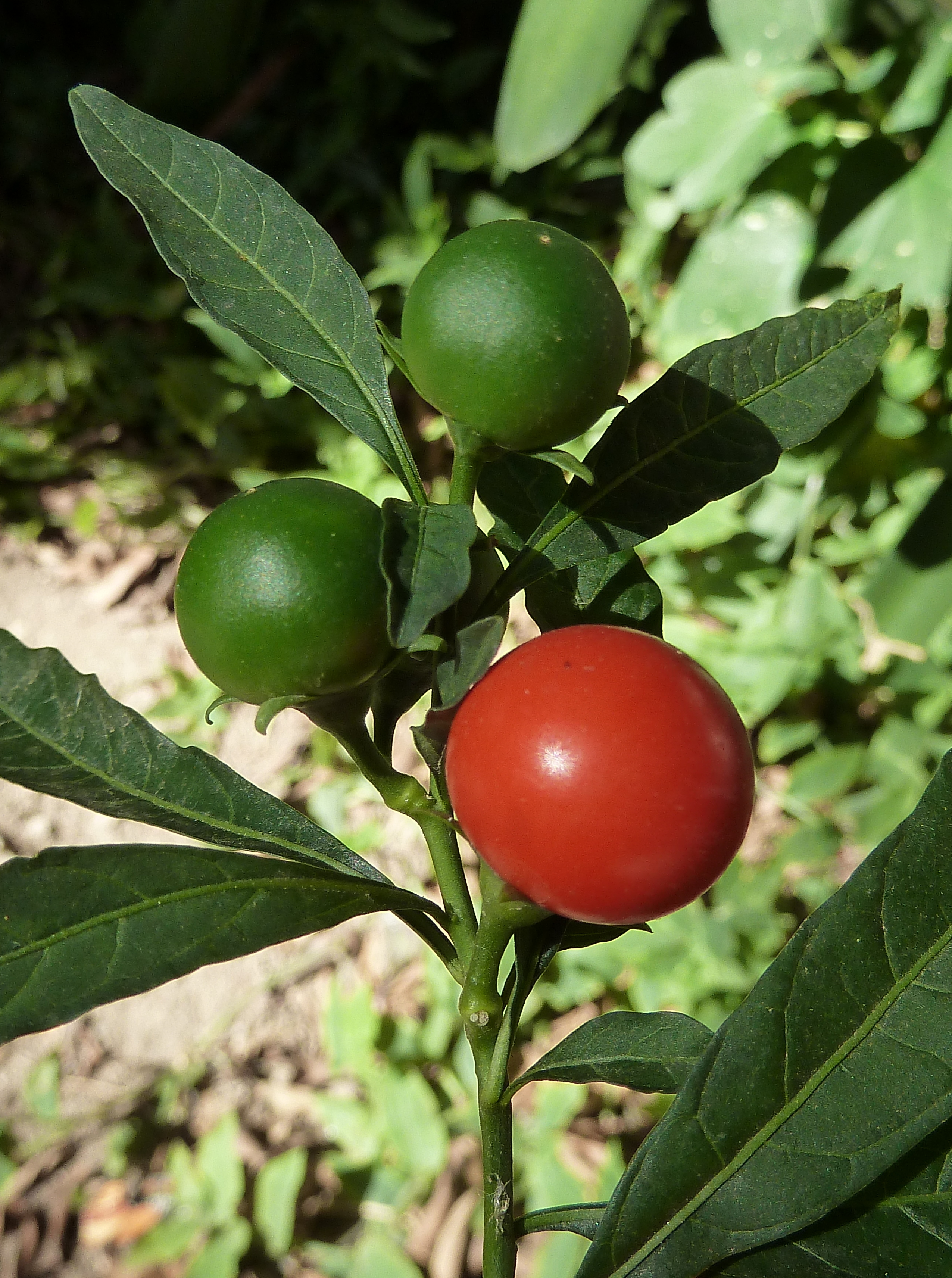 Solanum pseudocapsicum : Frutos verdes y maduro - Calle del Rey Carlos III (cultivado/ornamental), Águilas (Murcia, España).